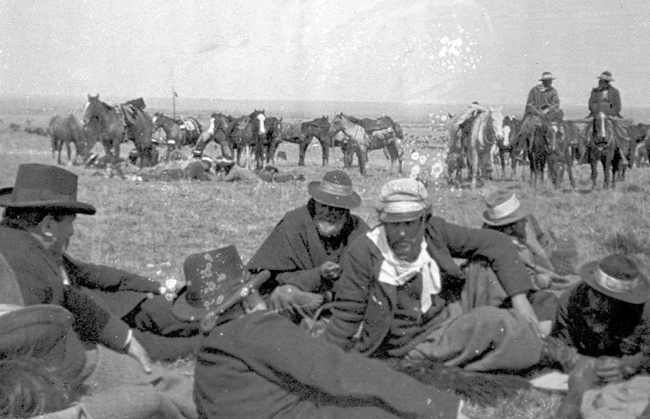 Jefes revolucionarios blancos en 1897 mientras esperaban los negociadores del gobierno durante la revolución blanca de 1897.